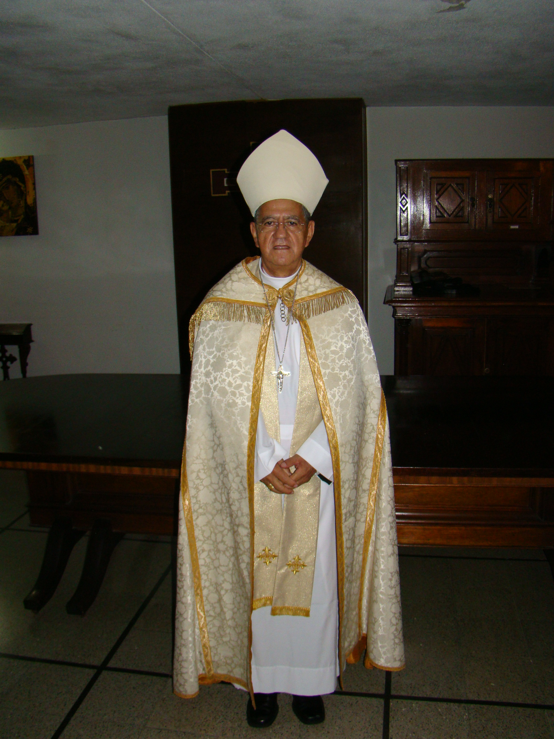 Monseñor Jorge Ivan Castaño, obispo auxiliar emérito de Medellín. Colombia